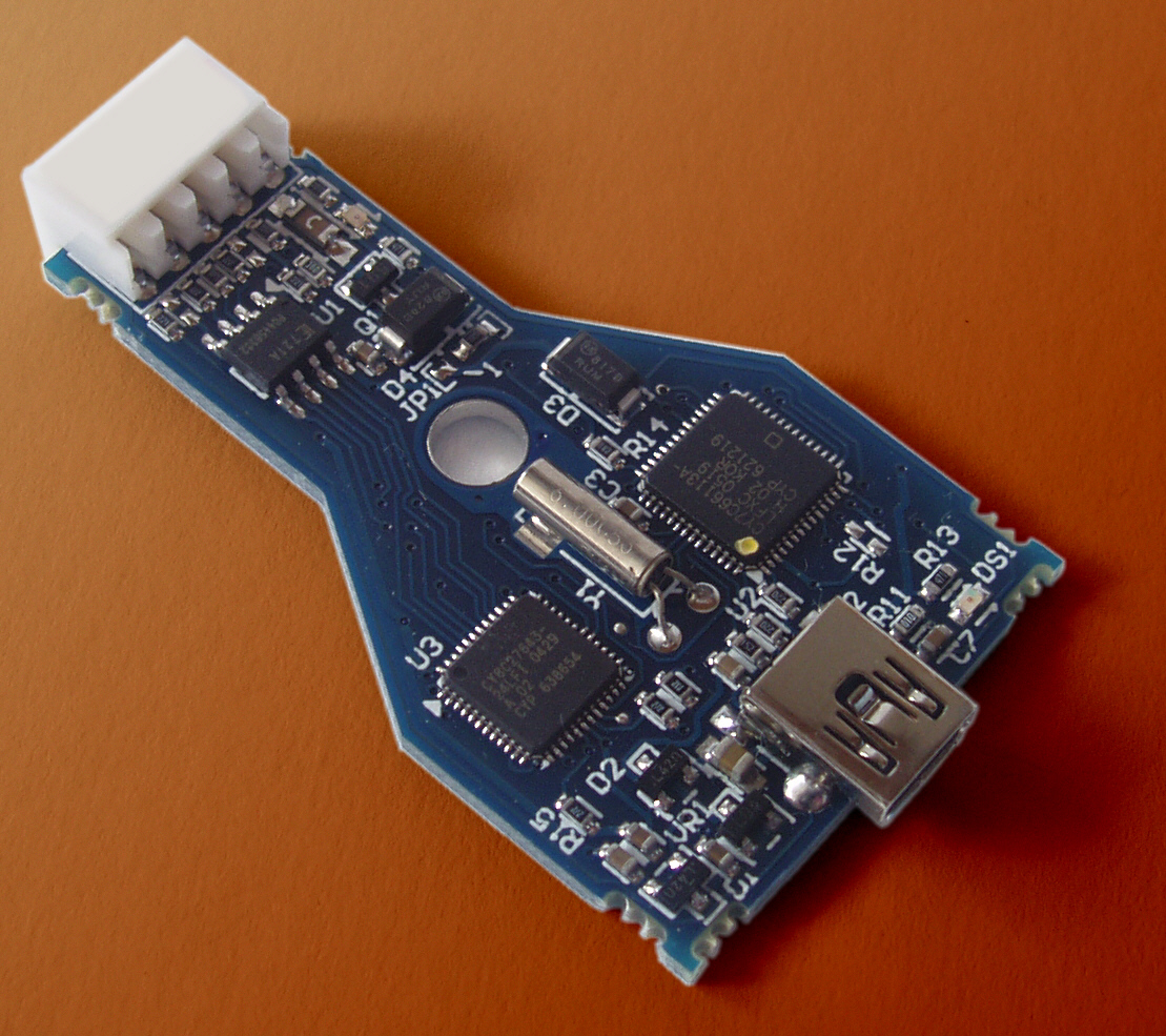 Cypress Miniprogrammer für PSoC Microcontroller (ohne Gehäuse)